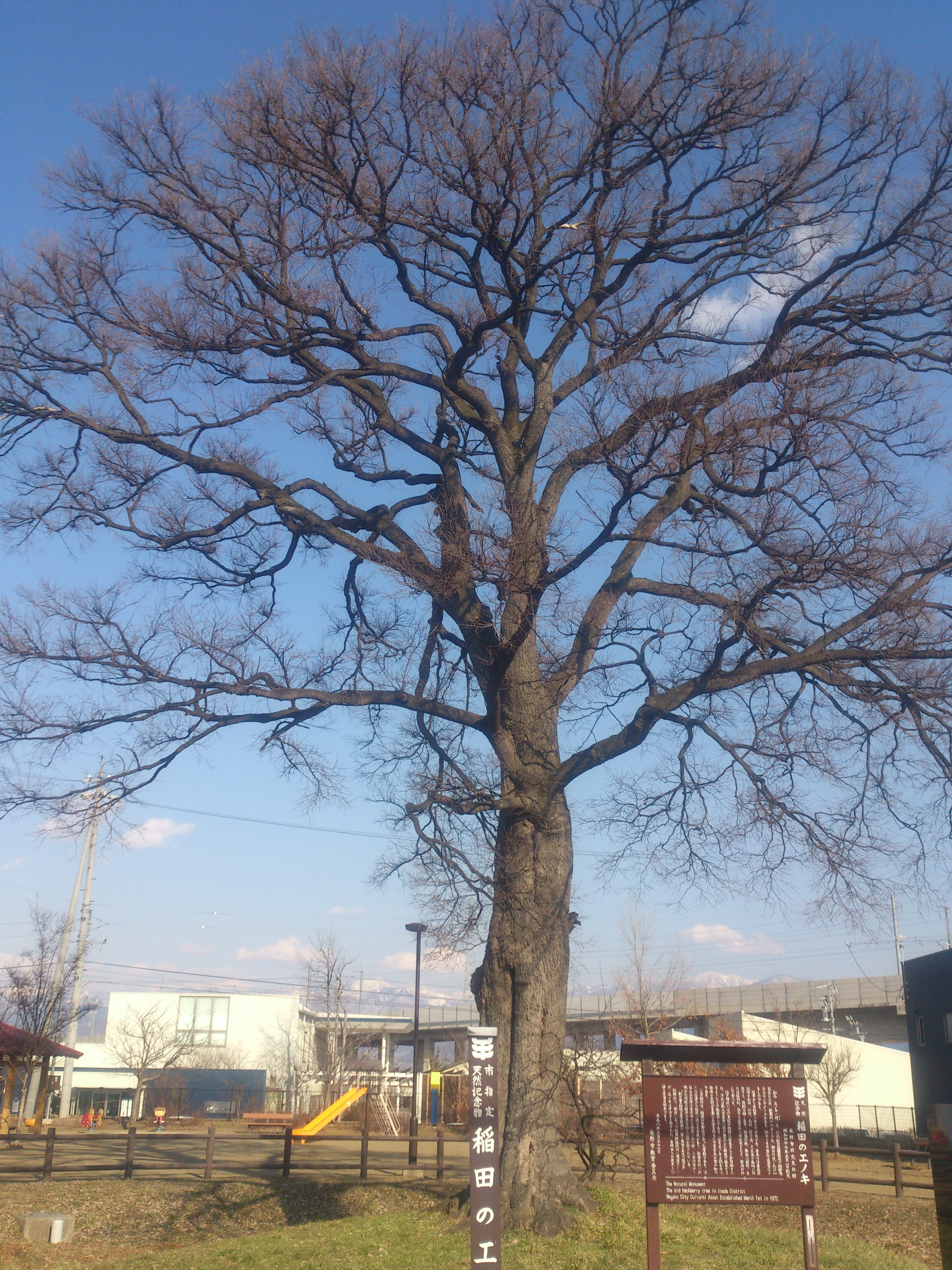 長野市指定天然記念物「稲田のエノキ」（長野市稲田三丁目）